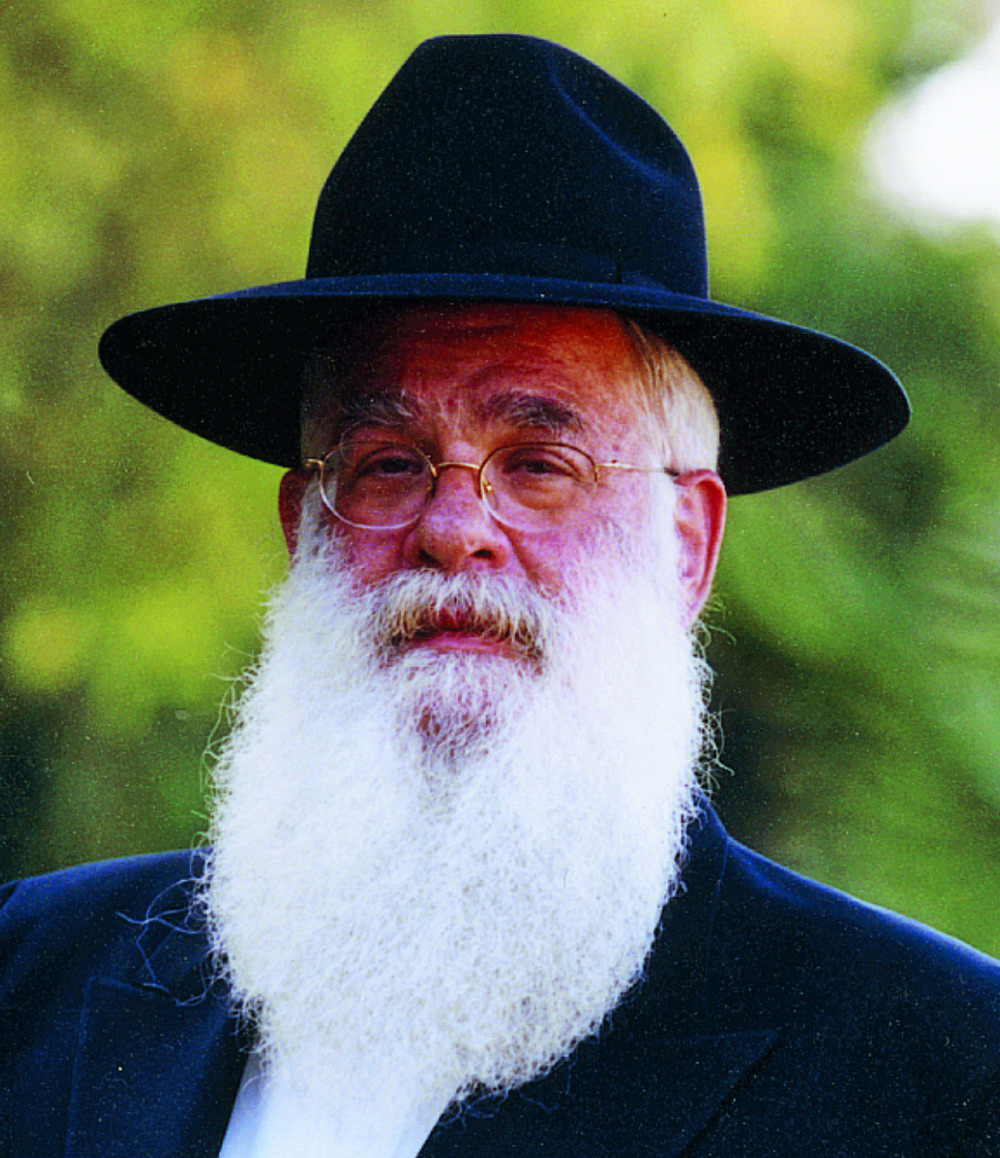 הרב לוי ביסטריצקי